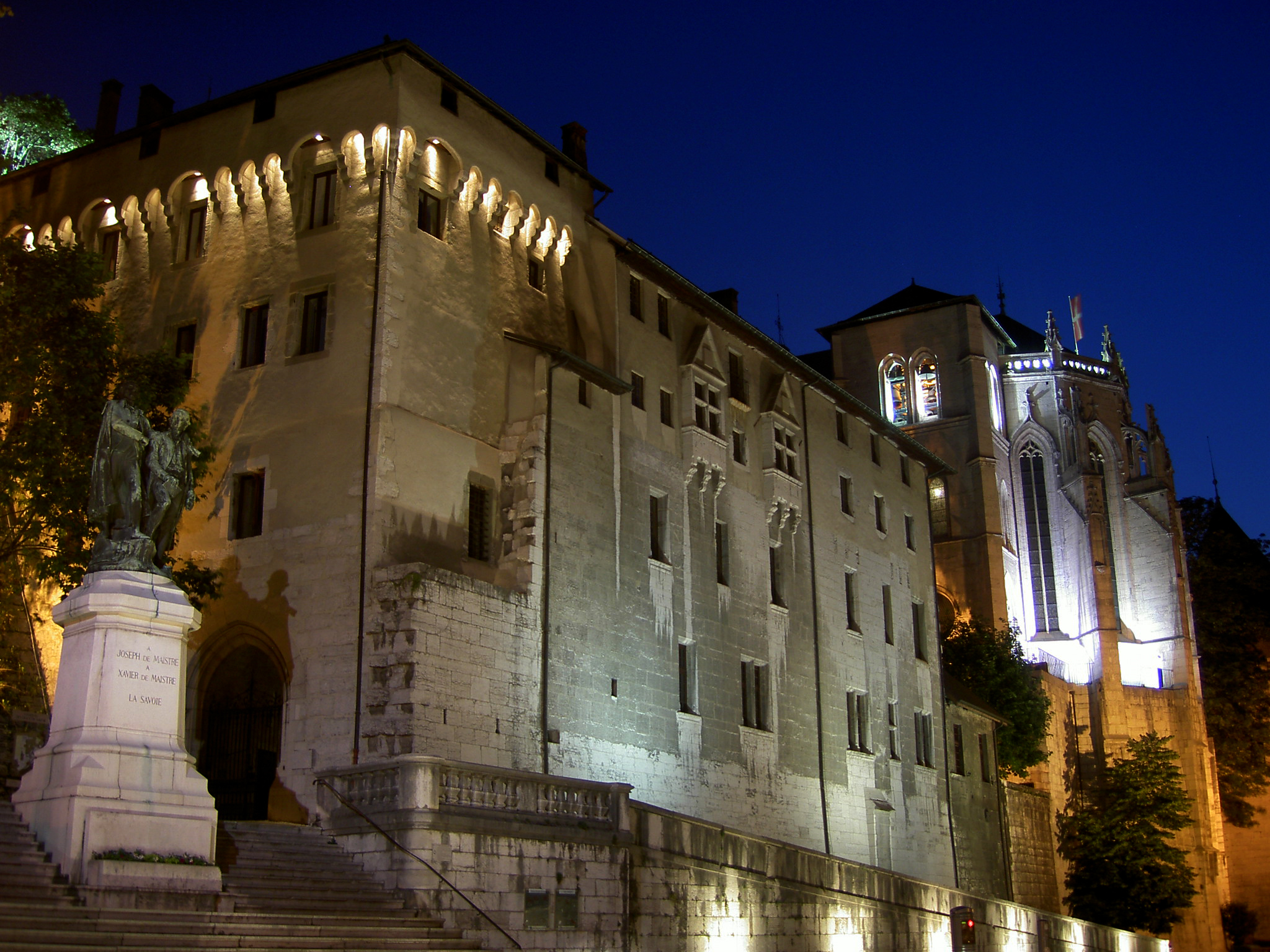 Le château des ducs de Savoie à Chambéry.